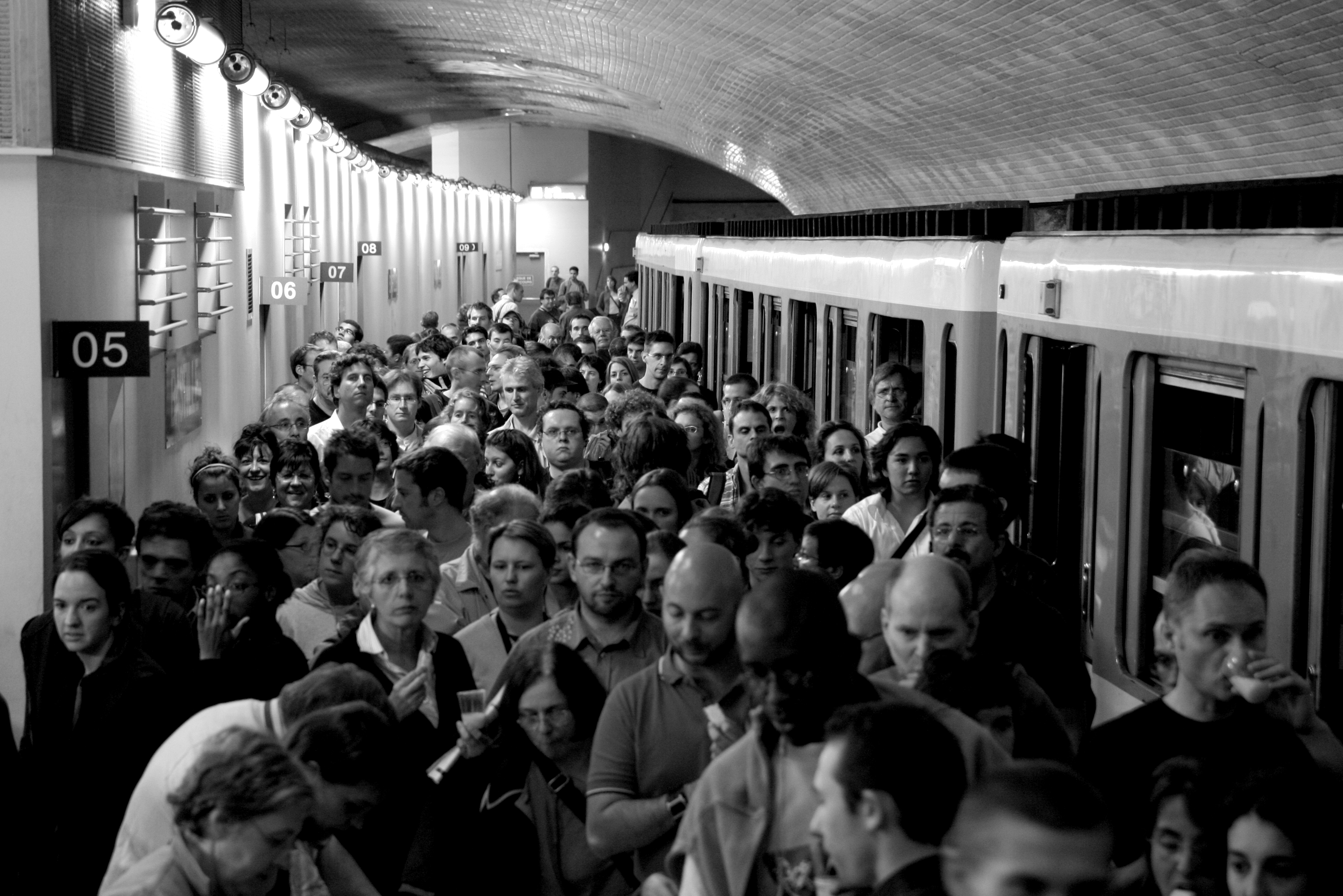 Gare du Nord USFRT lors des journées du patrimoine de septembre 2007.